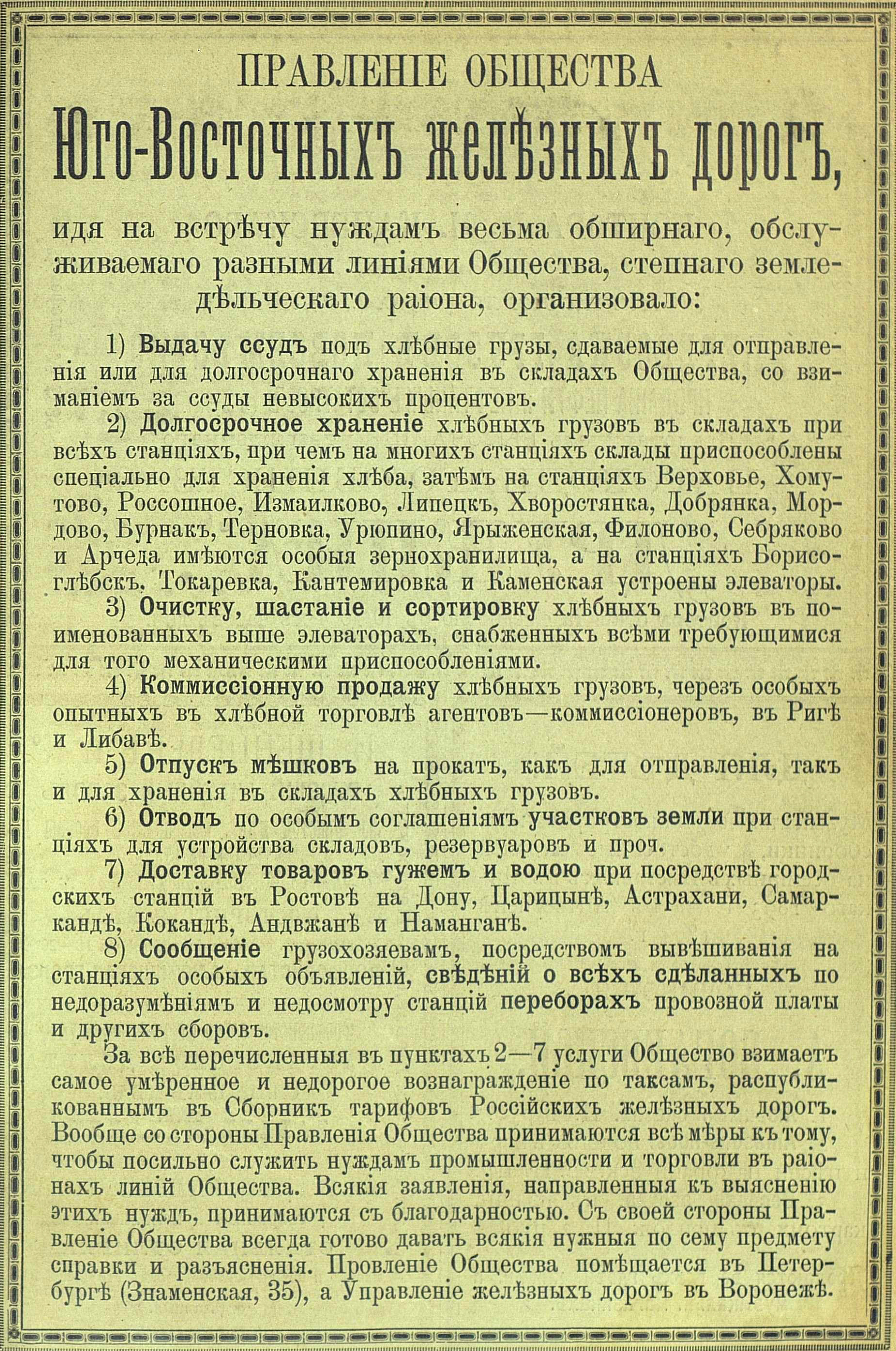 Реклама услуг Общества Юго-Восточных жел. дор., 1897 год.